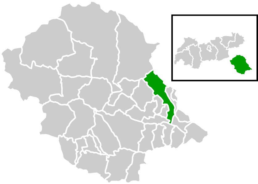 Lage der Gemeinde innerhalb des Bezirks Lienz